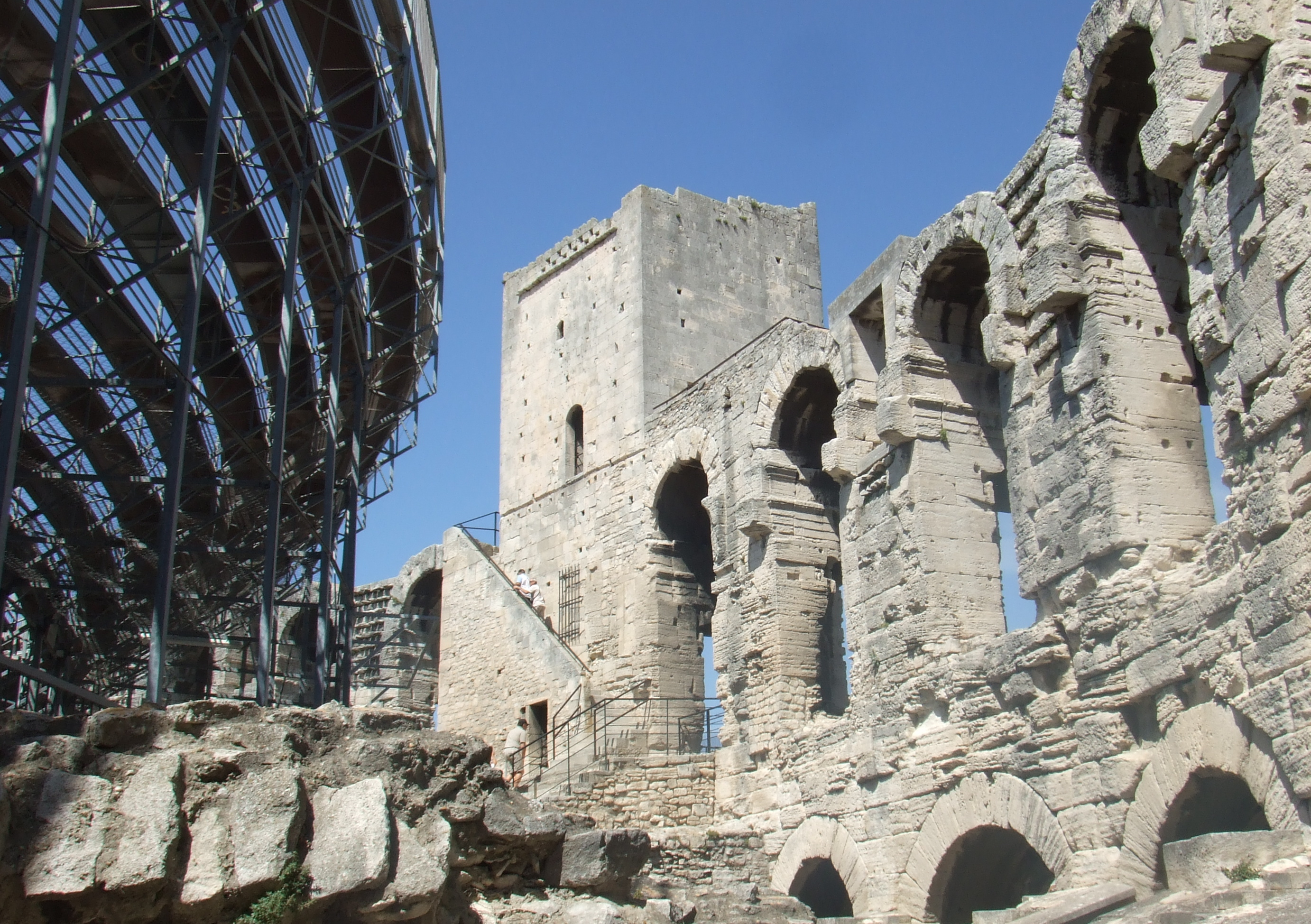 arènes d'arles 2009 .